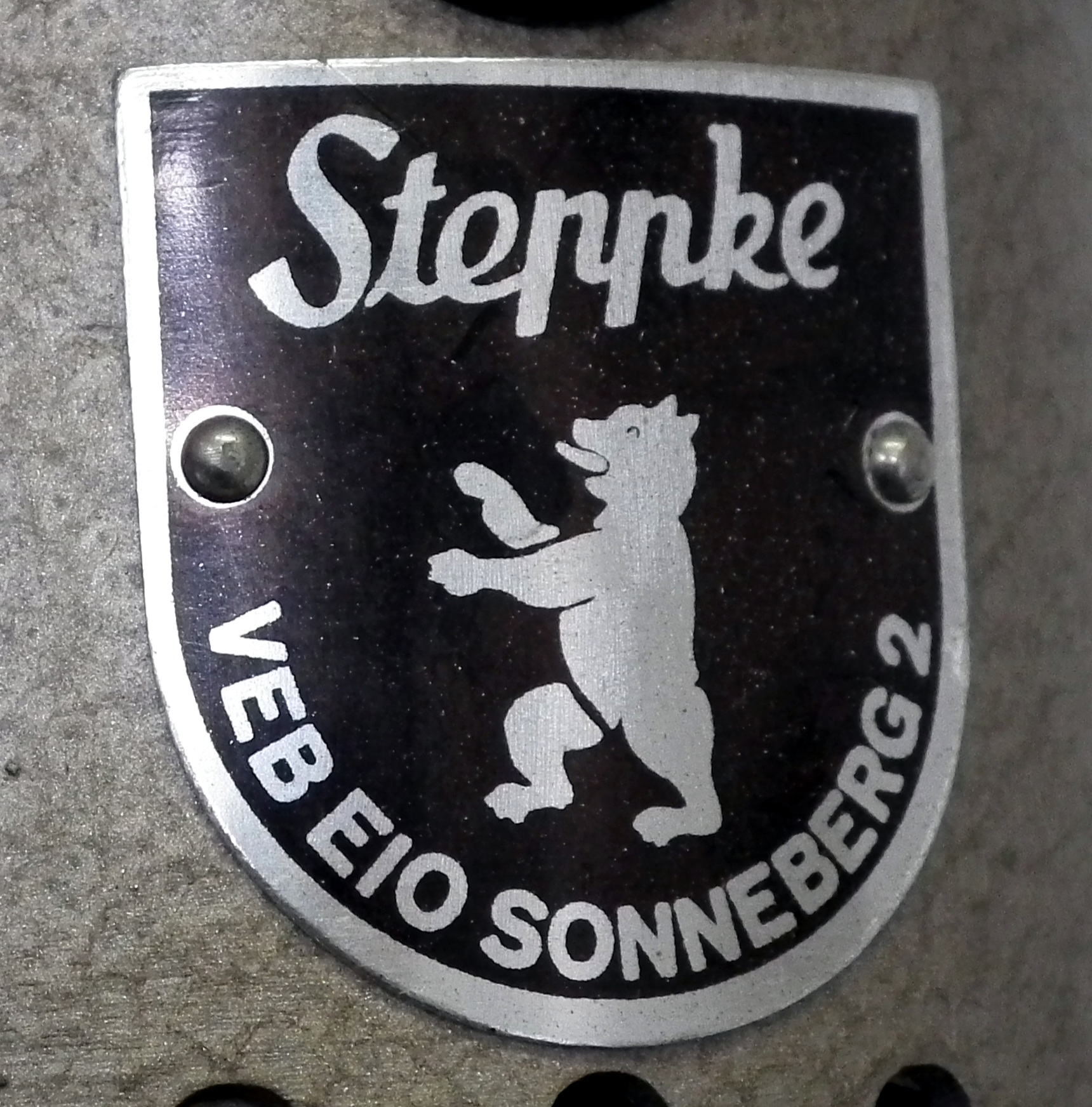 DDR Museum Zeitreise Radebeul, Staubsauger Steppke vom VEB EIO Sonnenberg, Fotografiert mit Genehmigung der Museumsleitung